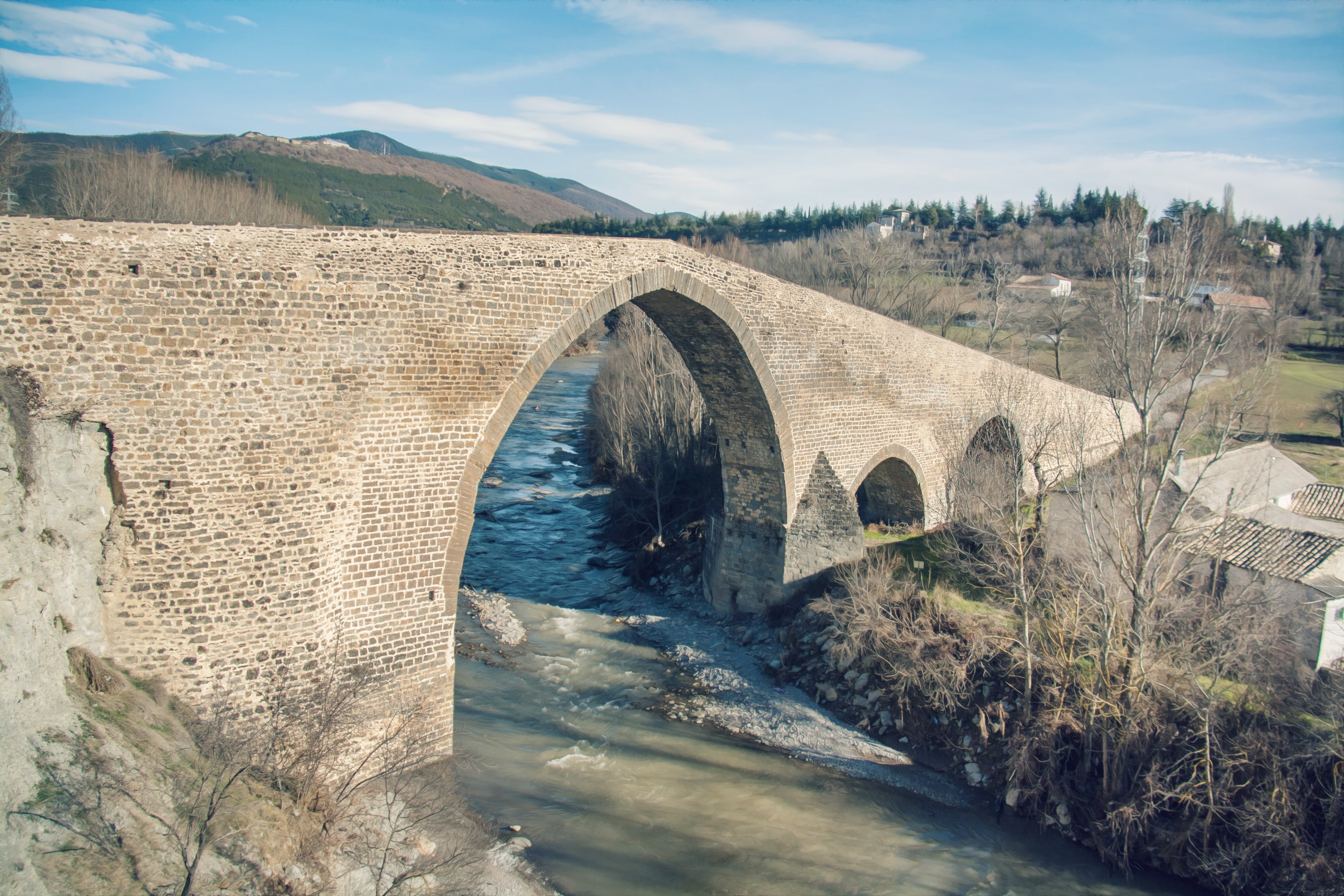 Jaca, España